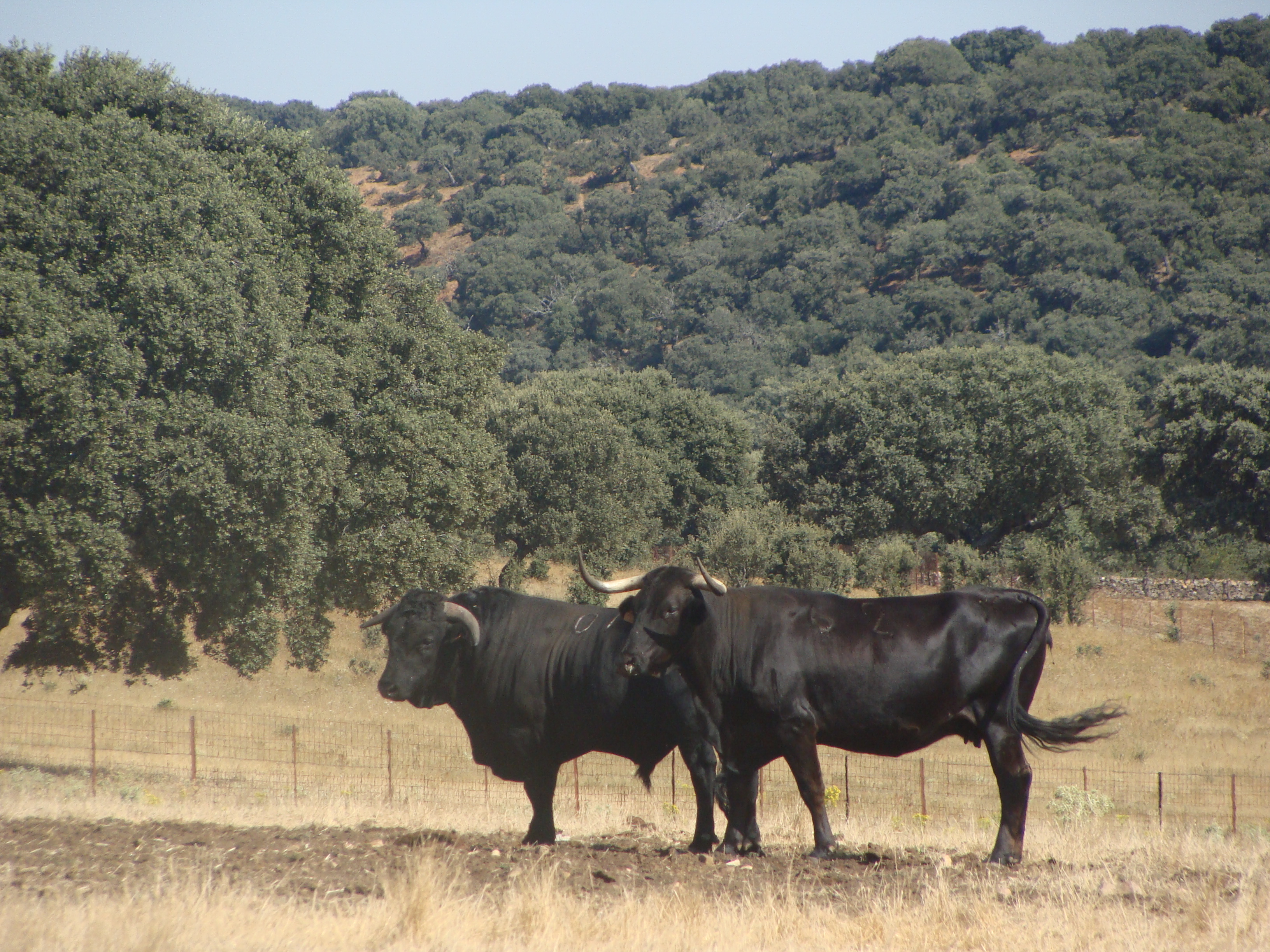 Vaca y toro dehesa